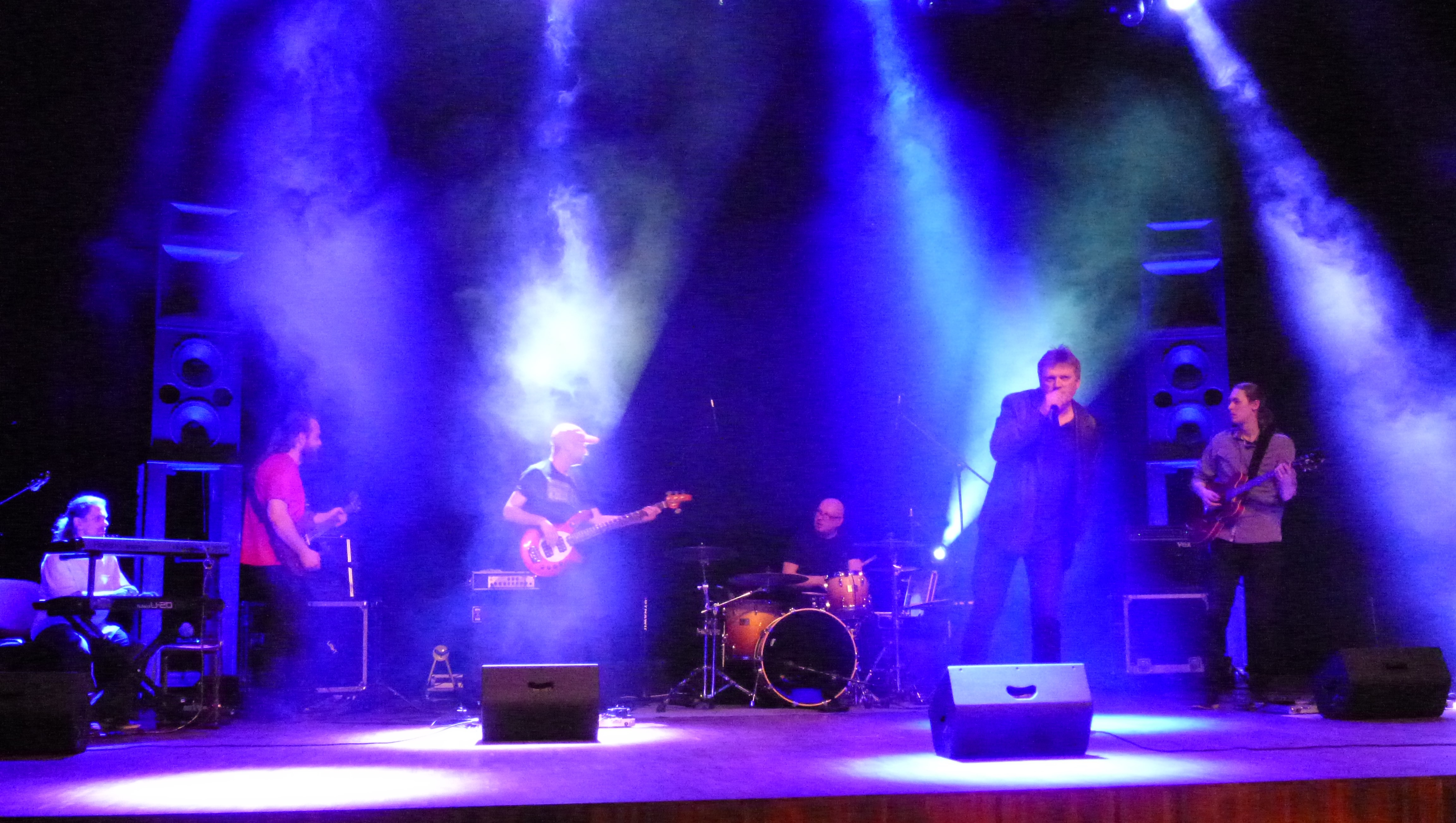 Wojciech Jasiński 2016-04-21 Nowa Dęba